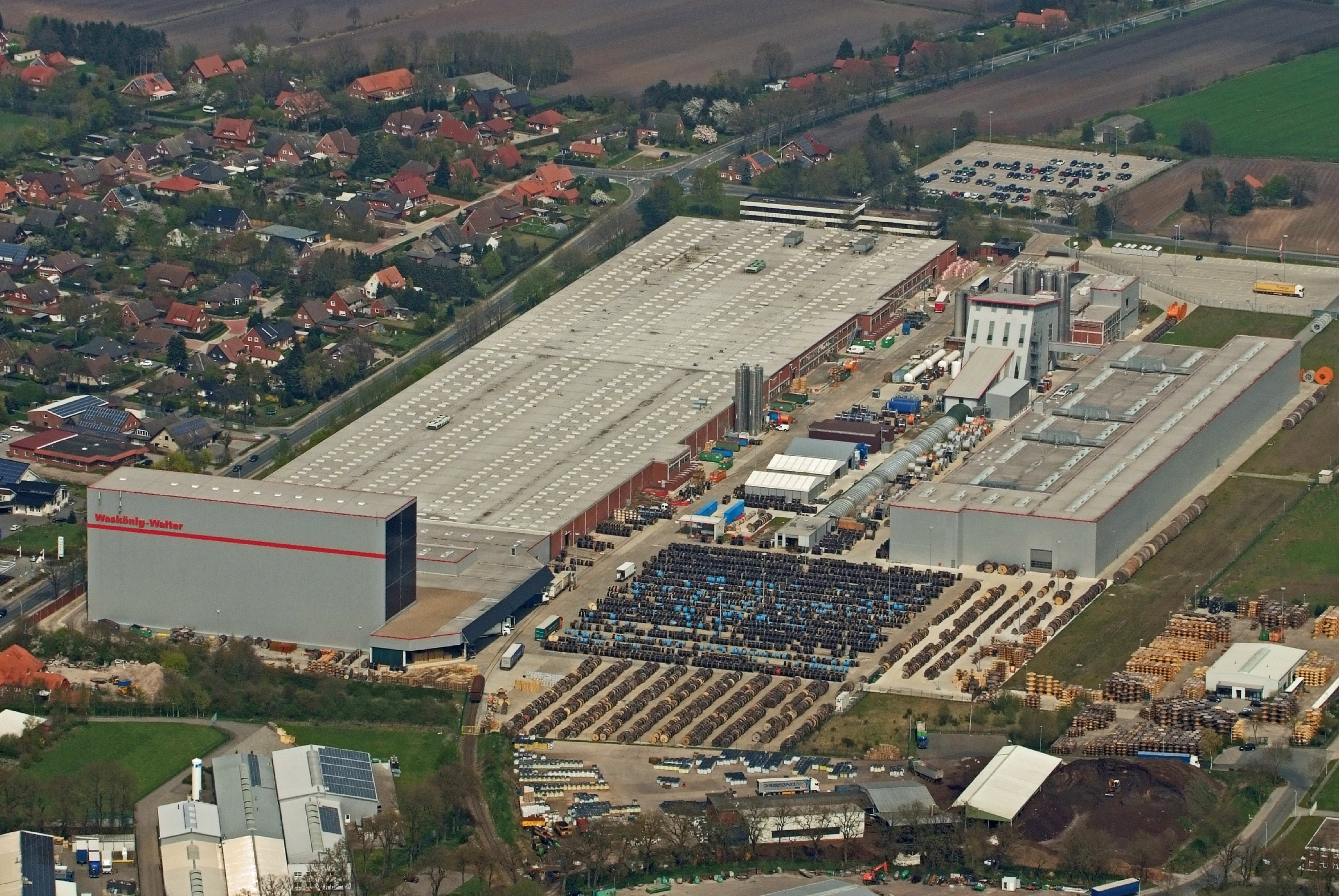 Waskönig + Walter Kabelwerk, Saterland / Fotoflug von Nordholz-Spieka nach Oldenburg und Papenburg